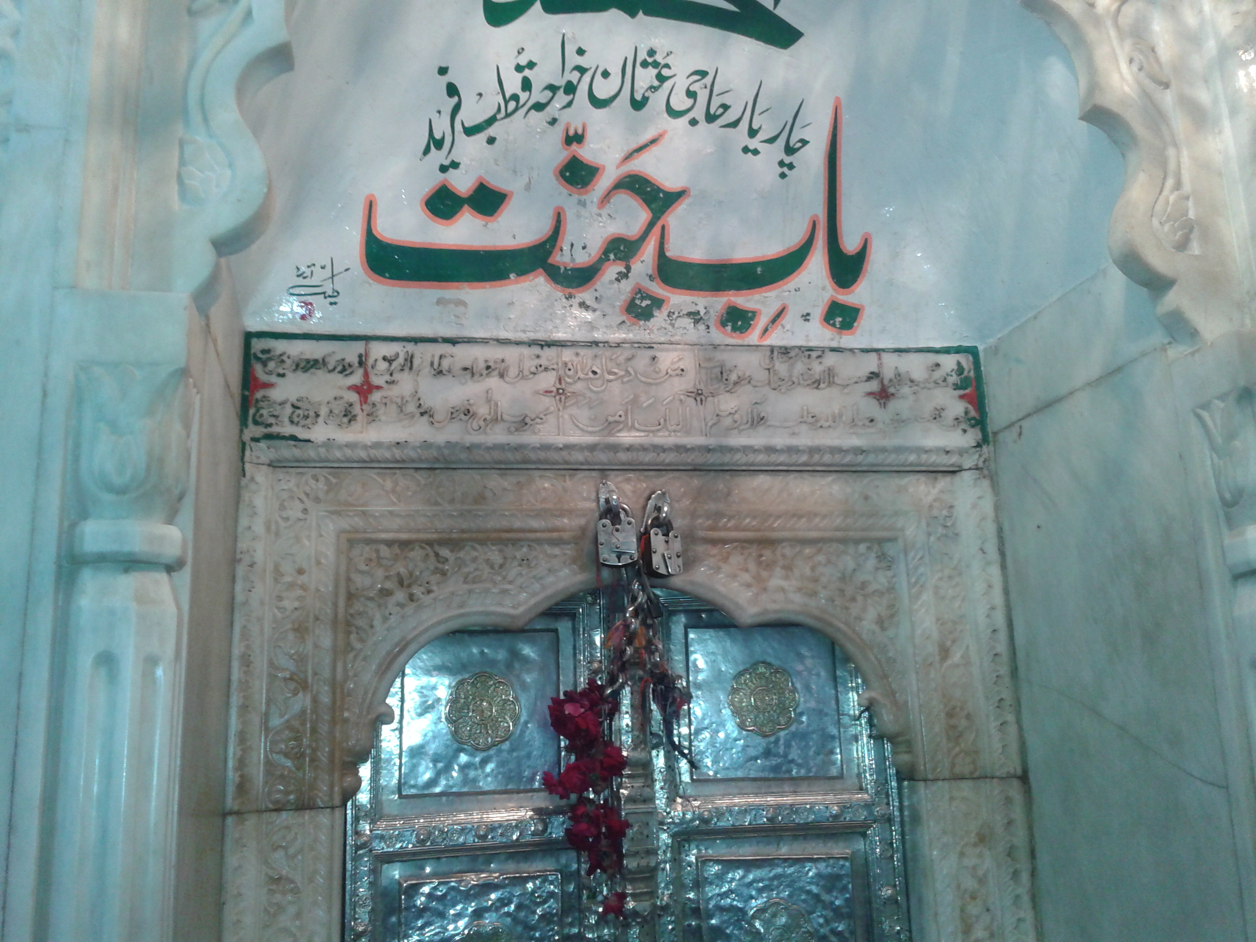 Bab-e-Jannat Darbar Hazrat Baba Farid ud Deen Ganj Shakar Rahmatullah Alaih